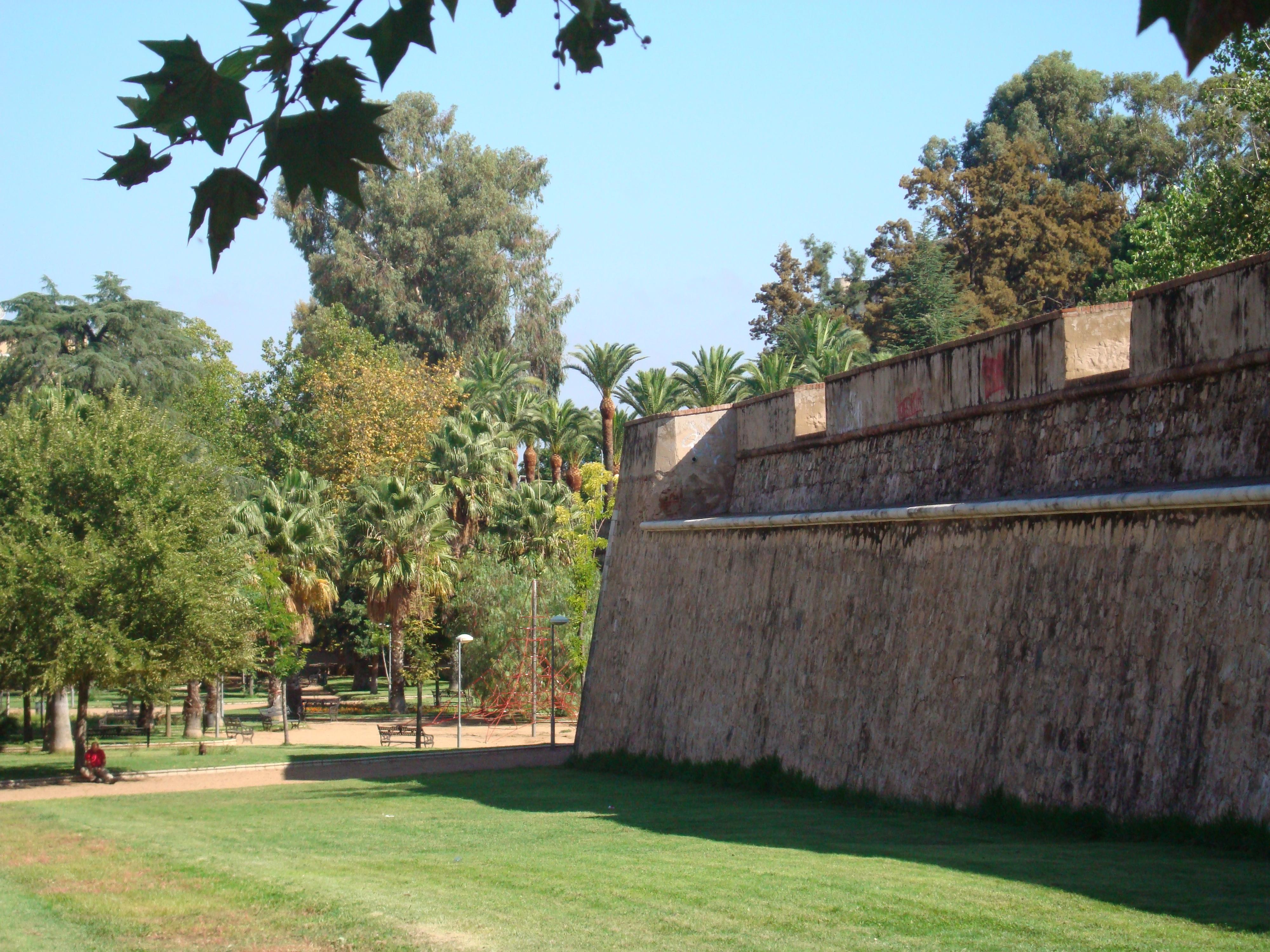 Baluarte de San José